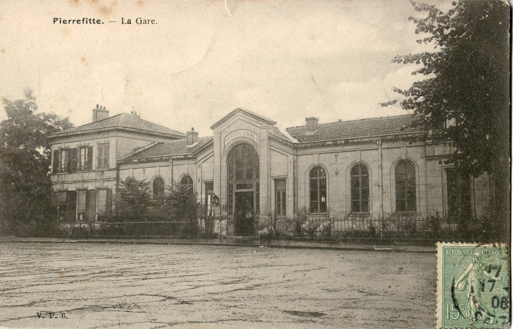 Carte postale ancienne éditée par VP, n°6 : Pierrefitte-sur-Seine - La Gare. La gare est dans son état d'origine, avec ses pavillons latéraux d'un seul étage.